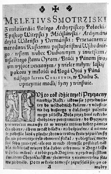 Karta z publikacji "Apologia peregrinacjej do Krajów Wschodnich" Melencjusza Smotryckiego.